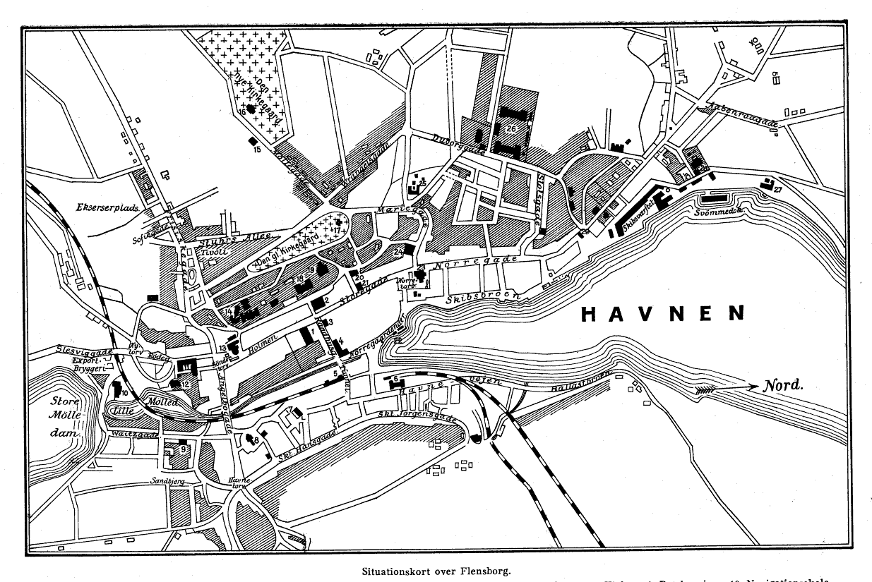 Bykort over Flensborg by fra anden halvdel af 1800-tallet. Forklaringer: 1. Raadhus. 2. Teater. 3. Rigsbankfilial. 4. Posthus. 5 og 6. Banegaarde. 7. Elektrisk Station. 8. Skt Hans Kirke. 9. Retsbygning. 10. Navigationsskole. 11. Gymnasium. 12. Helligaands-Klosteret. 13. Skt Nikolaj Kirke. 14. Retsbygning. 15. Vandreservoir. 16. Den ny Kirkegaard. 17. Den gamle Kirkegaard. 18. Museum. 19. Overrealskole. 20. Katolsk Kirke. 21. Dansk Kirke. 22. Dampskibspavillon. 23. Skt Marie ell. Vor Frue Kirke. 24. Skt Franciskus Hospital. 25. Diakonissestiftelse. 26. Kaserne. 27. Karantæneanstalt. 28. Gasværk. 29. Nørreport. 30. Slagteri.